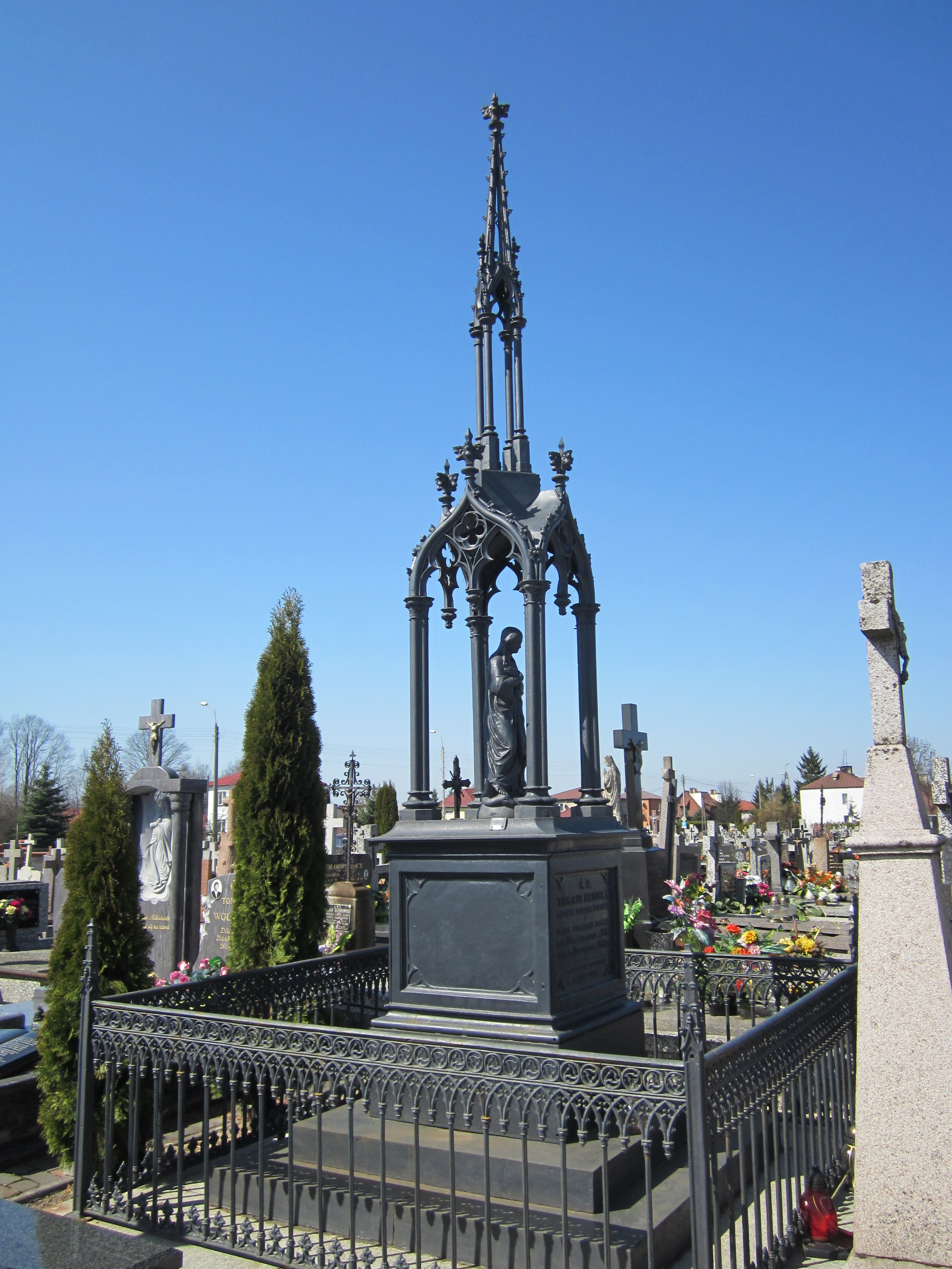 Wysokie Mazowieckie - cmentarz rzymskokatolicki, grobowiec Tomasza Brzoski oficera Wojska Polskiego z roku 1831. Jest to jeden z najstarszych grobowców uczestnika powstania listopadowego pochodzącego z Brzósk. (zabytek nr A-367 z 20.04.1988) Tydzień po dniu Wszystkich Świętych można ujrzeć po renowacji grobowiec Tomasza Brzoski. A wszystko to zasługa ks. prał. mgr Ryszard Niwińskiego, który po raz pierwszy zorganizował kwestę na renowację zabytkowych nagrobków na cmentarzu w Wysokiem Mazowieckiem.